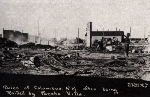 Fotografía de la Batalla de Columbus